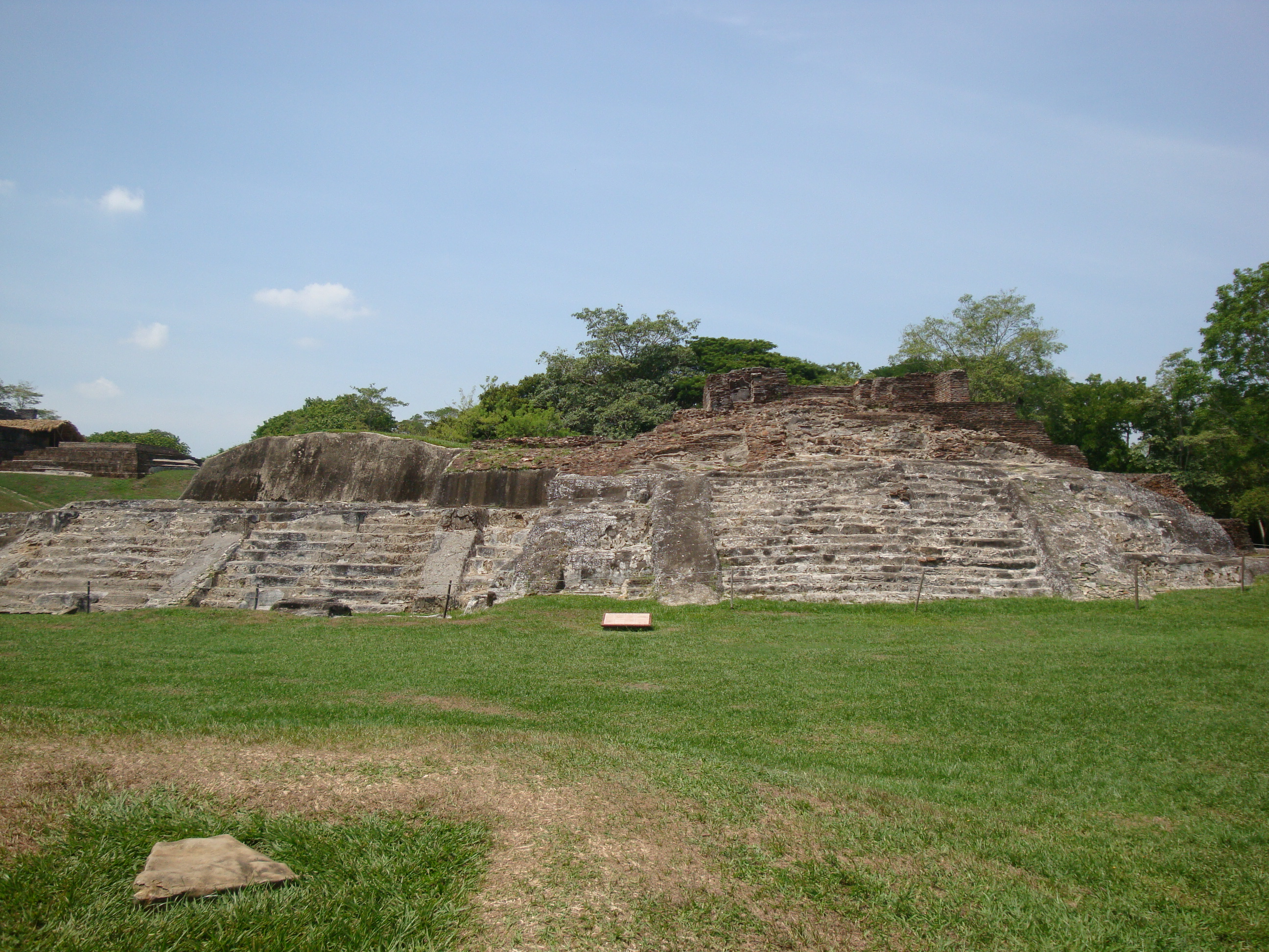 Templos III y III-A, zona arqueológica maya de Comalcalco, Tabasco, México.